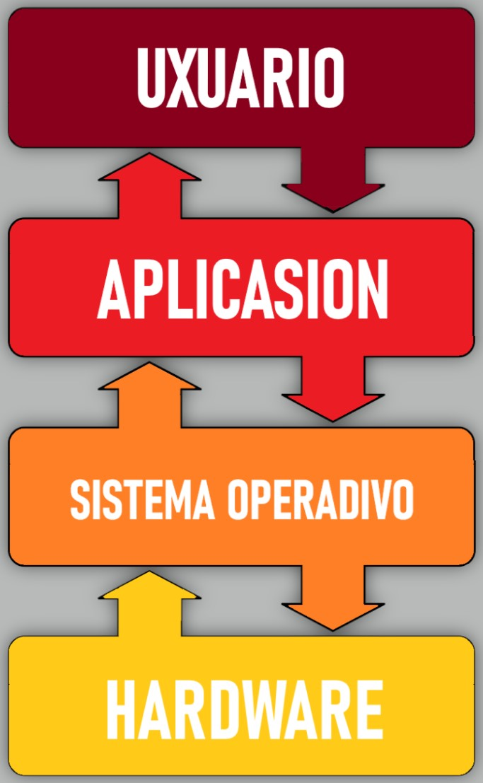 Vèneto: Schema execusion de na aplicasion.